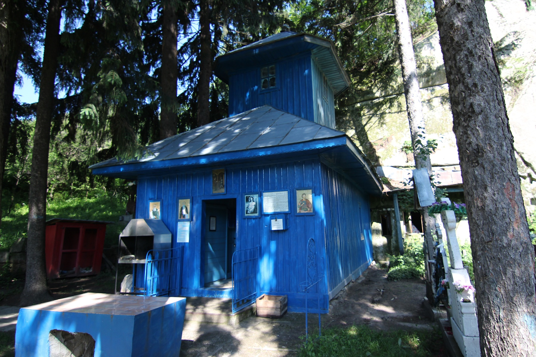 Biserica rupestră "Tăierea Capului Sf. Ioan Botezătorul", Ansamblul rupestru de la Aluniș 01